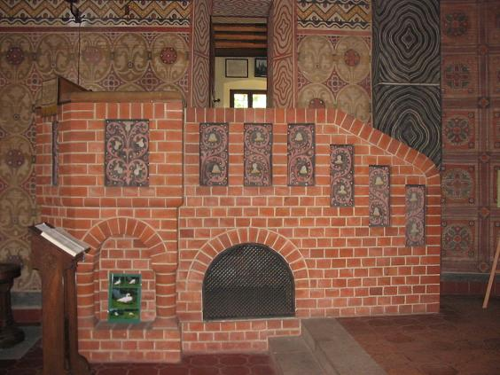 Kirche Gröben, Brandenburg. Kanzel.